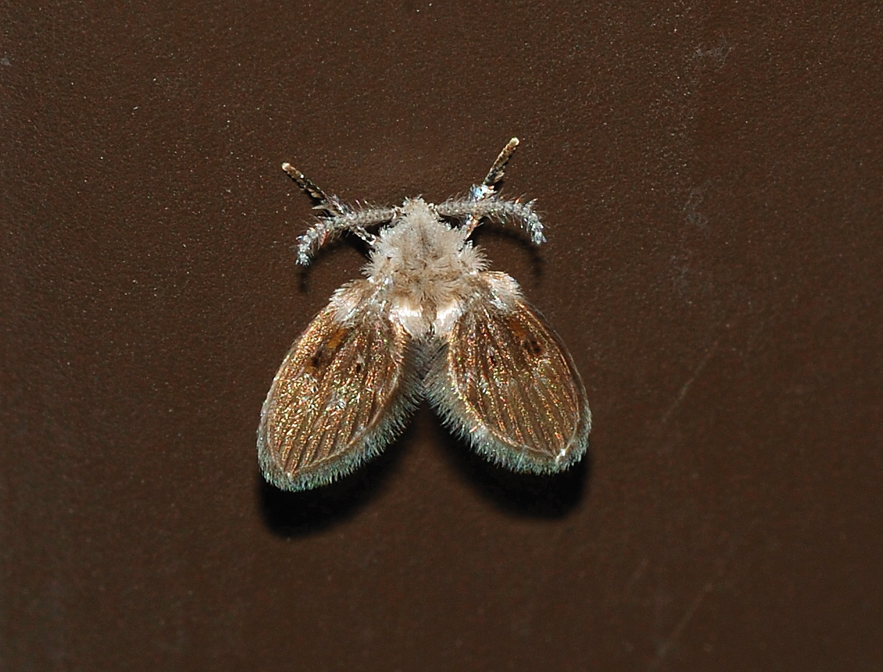 A drain fly (Clogmia albipunctata)